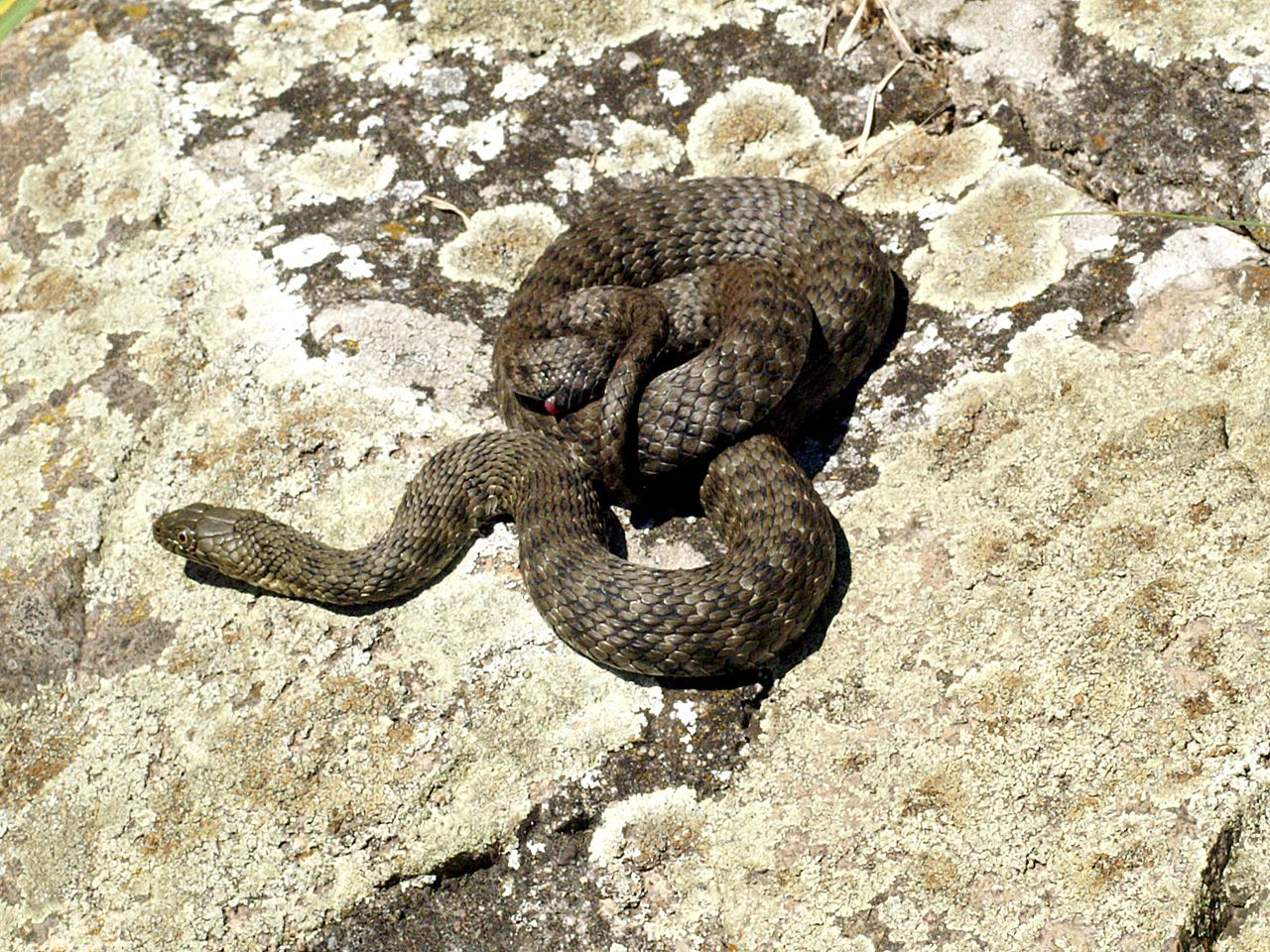 Natrix tessellata